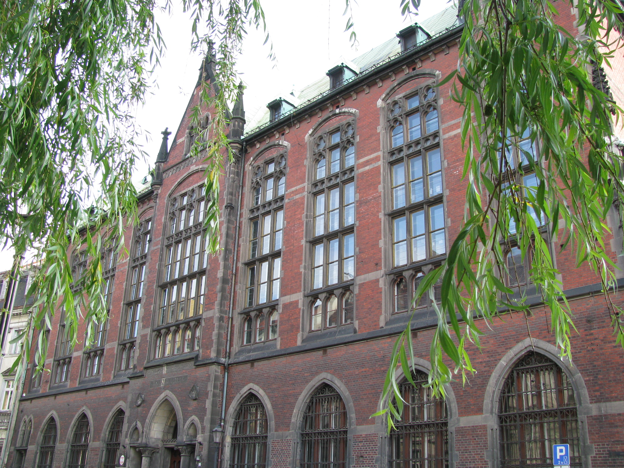 Biblioteka Uniwersytecka we Wrocławiu